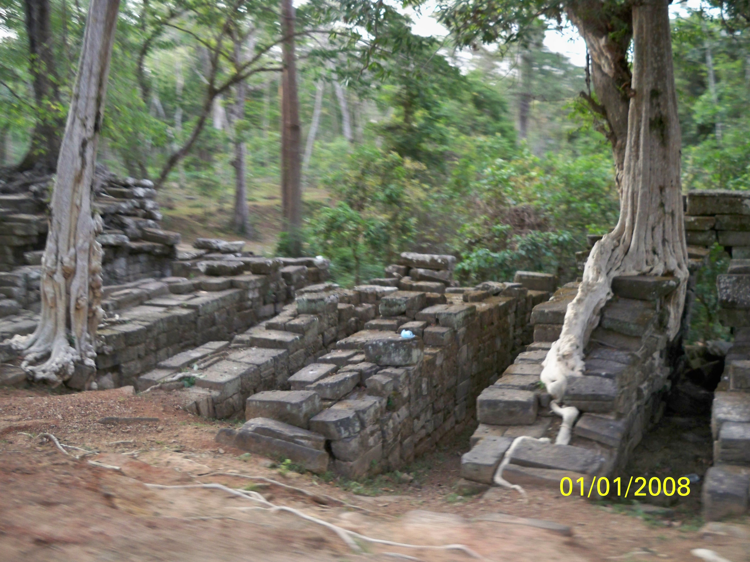 Phan Minh Châu chụp tại Spean Thma Angkor THom